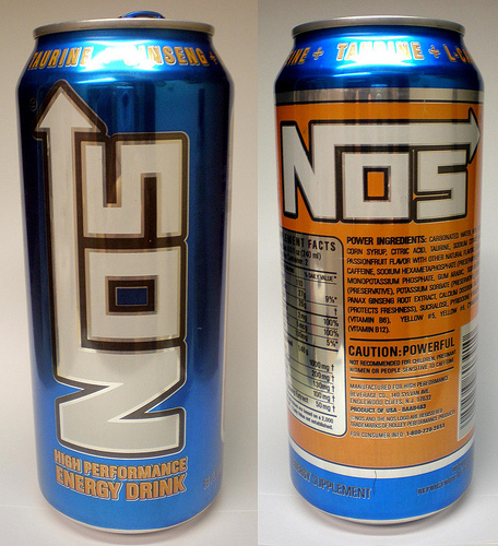 NOS High Performance Energy Drink